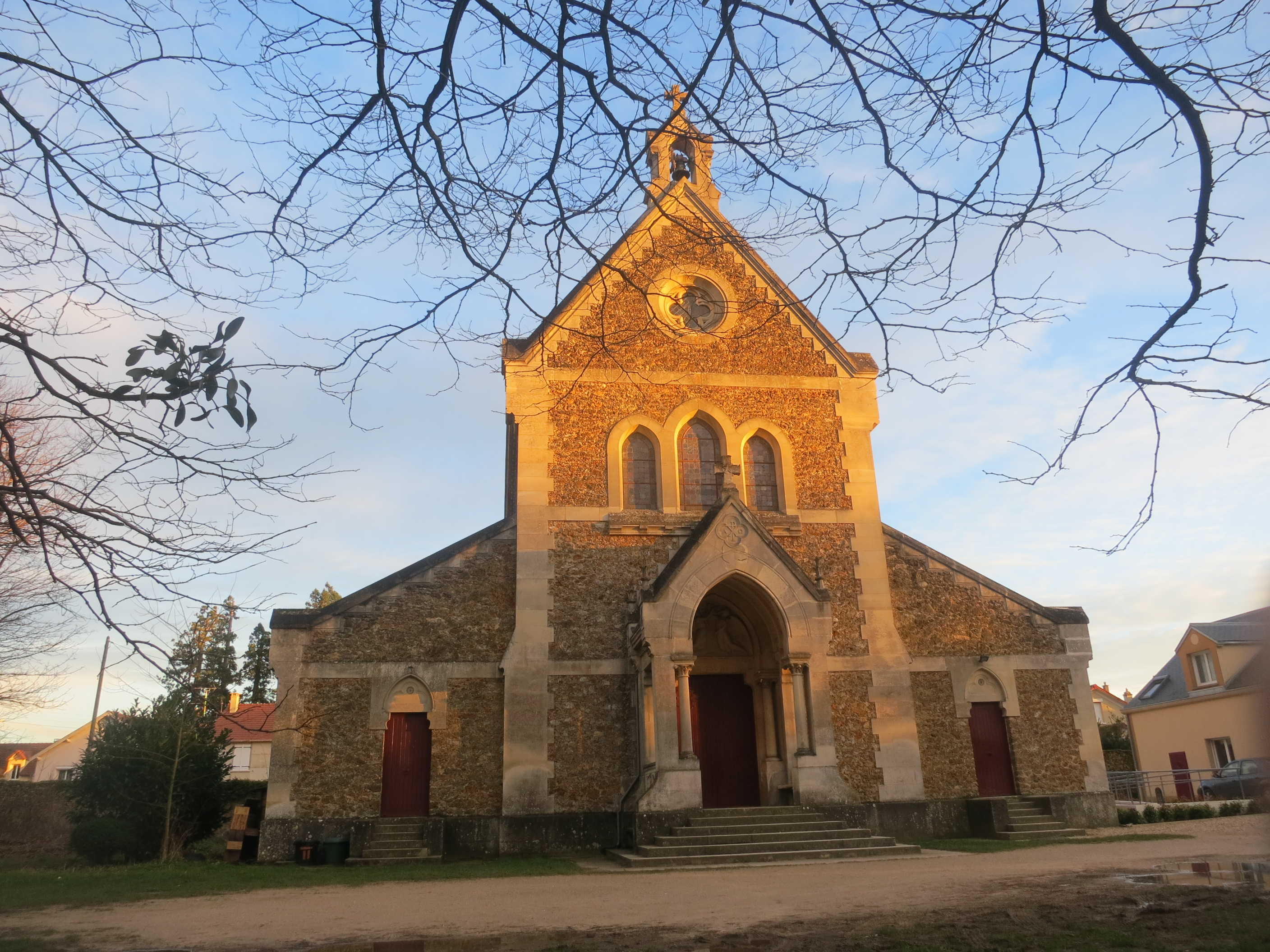 Tempio protestante a Boissy-St-Léger